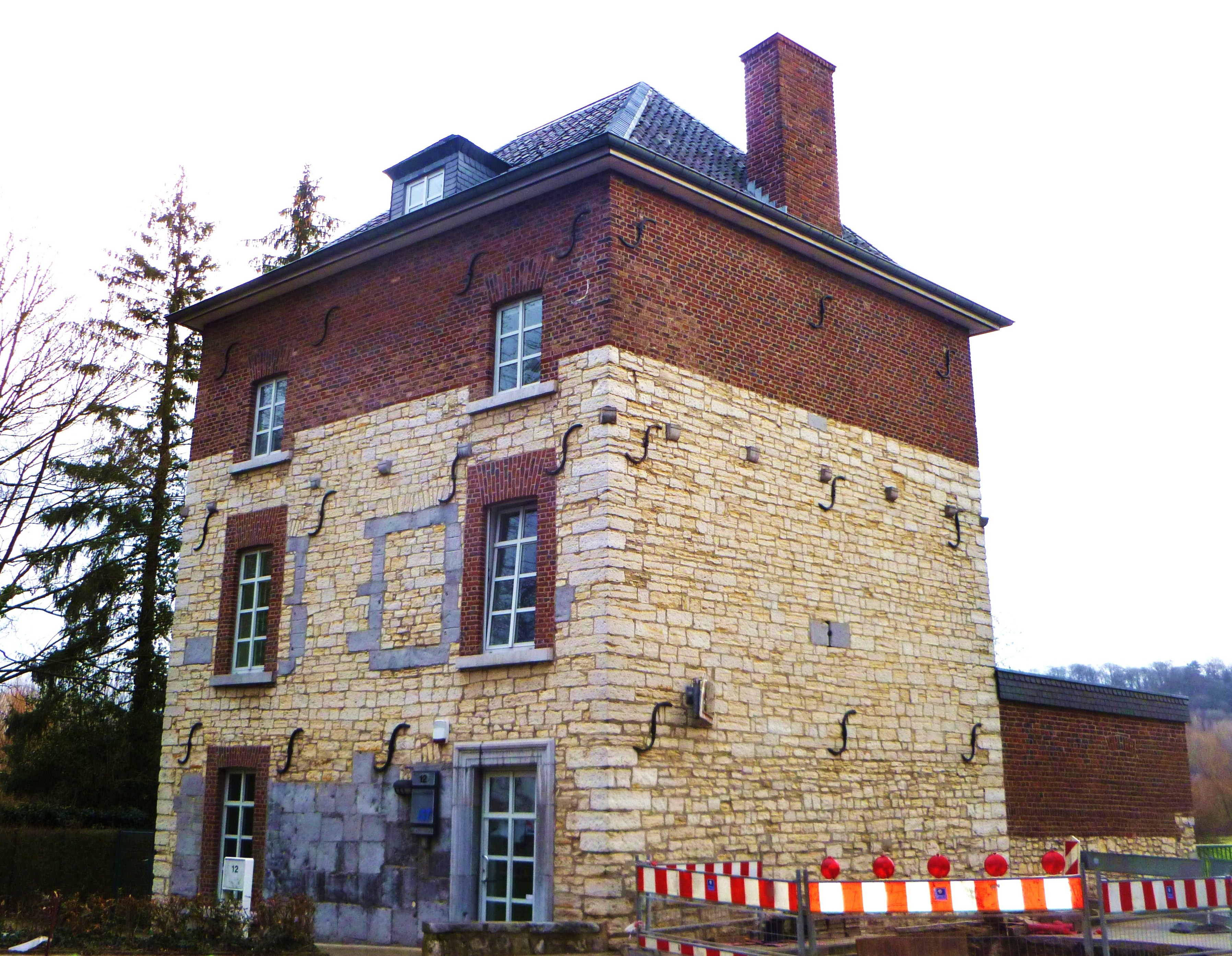 Baudenkmal in Aachen-Laurensberg